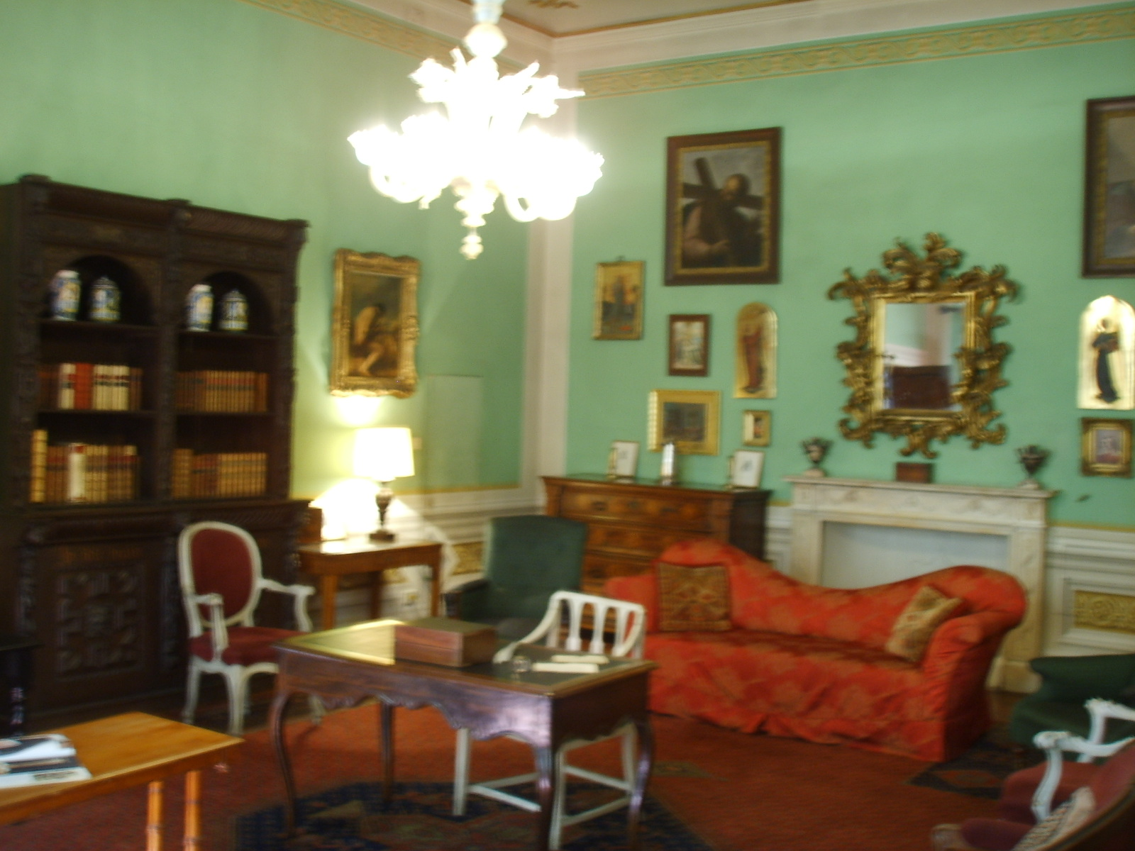 Casa Guidi museum in Florence, Italy